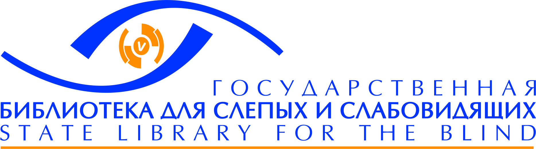 Логотип Санкт-Петербургской государственной библиотеки для слепых и слабовидящих с 2011 года